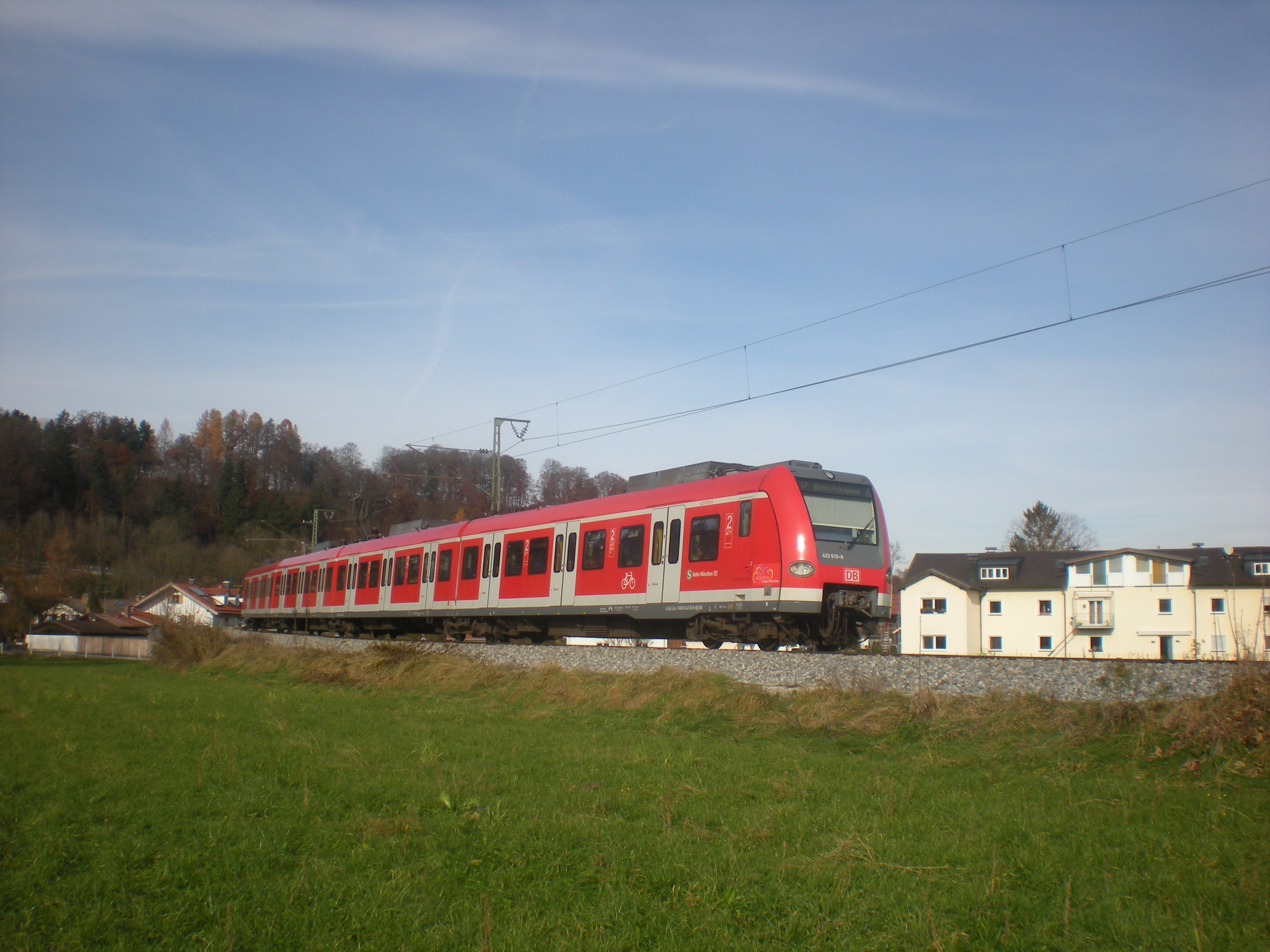 Zug der Münchner S-Bahnlinie S7 mit Baureihe 423 auf der Isartalbahn in Wolfratshausen